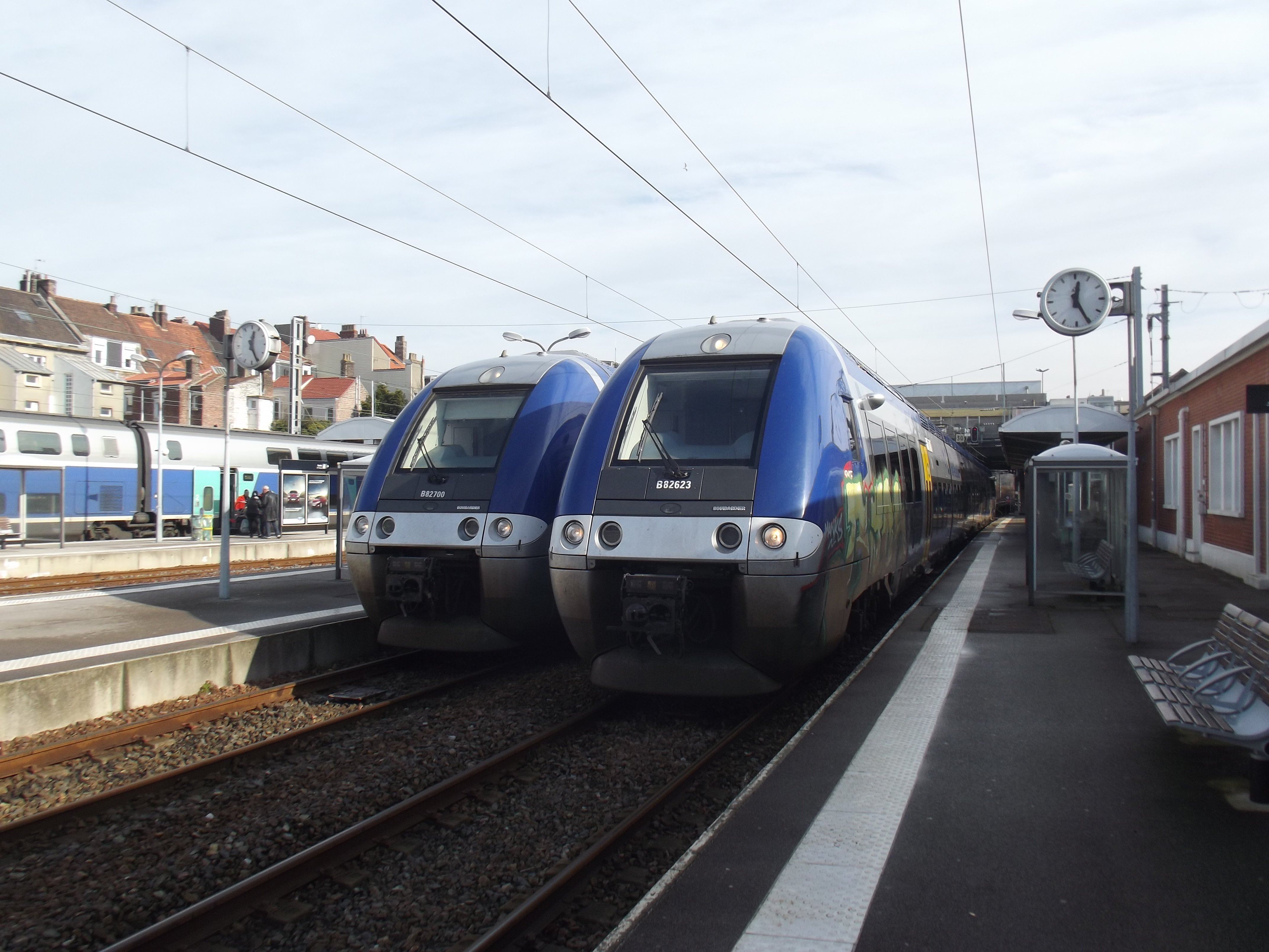 Vertrek nieuwe elektrische treindienst naar Duinkerke